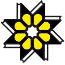 Arm-Ricest